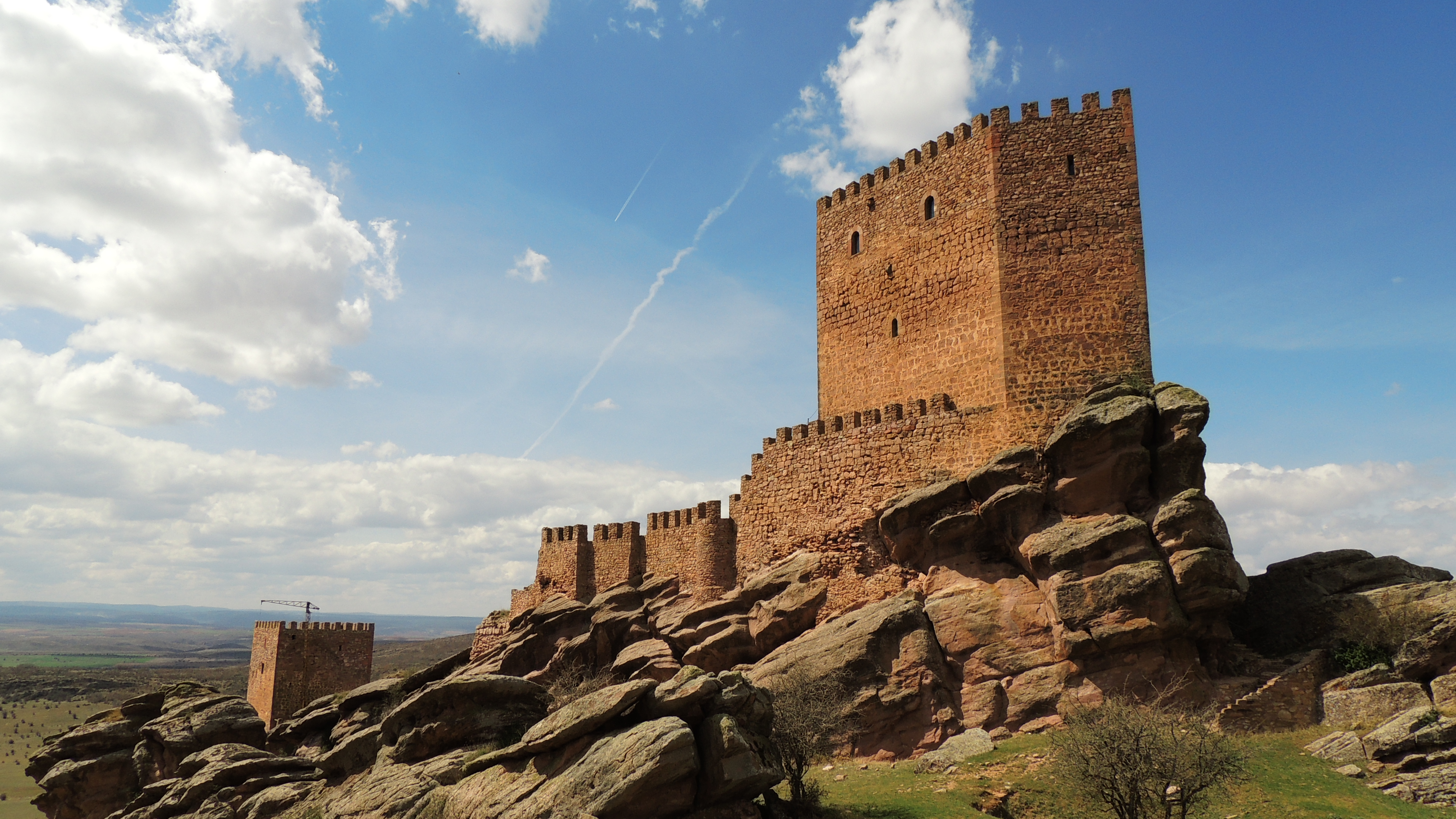 Castillo de Zafra